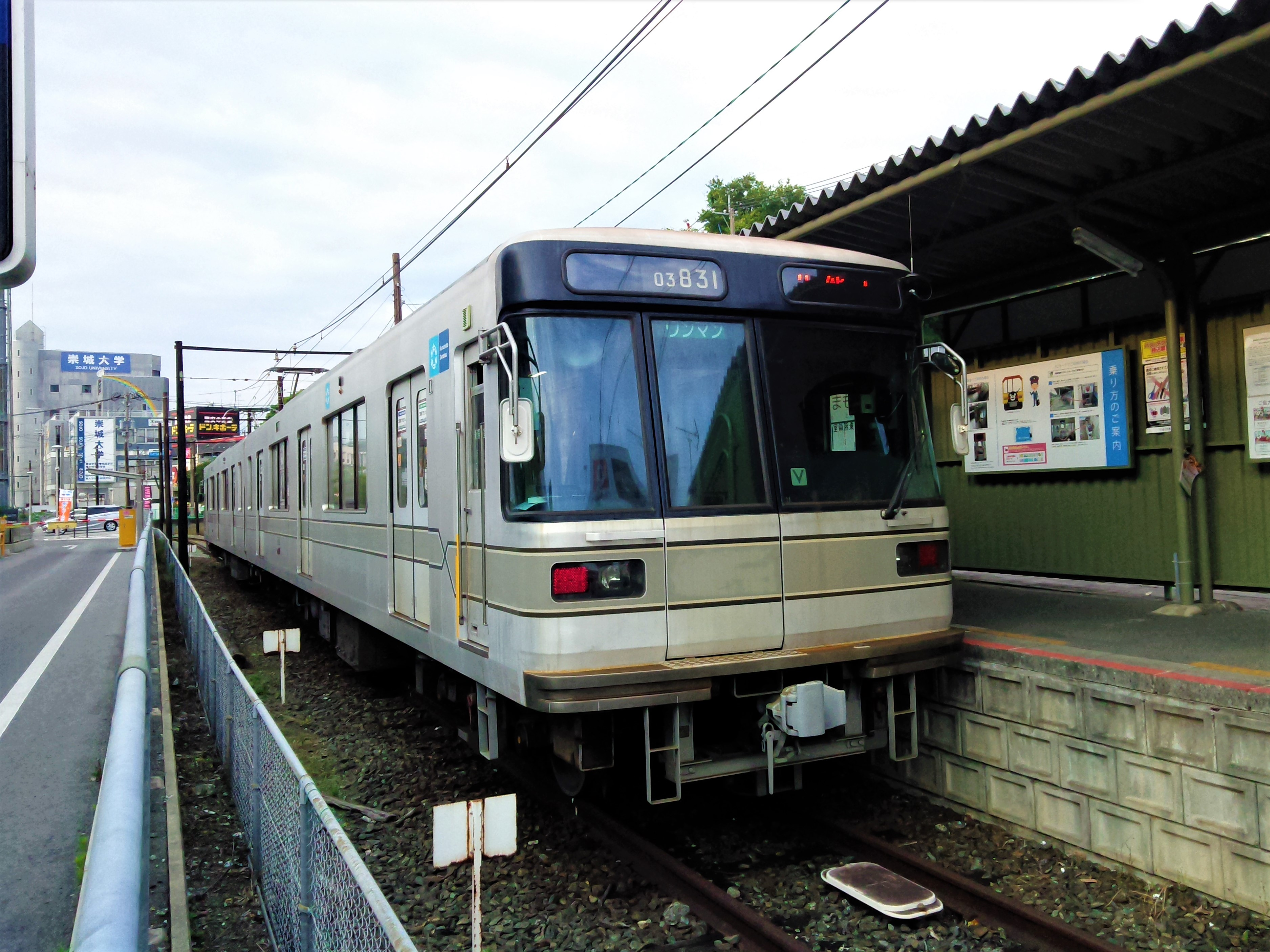 東京メトロから熊本電気鉄道に譲渡された03系電車、上熊本駅にて。スカート装備前